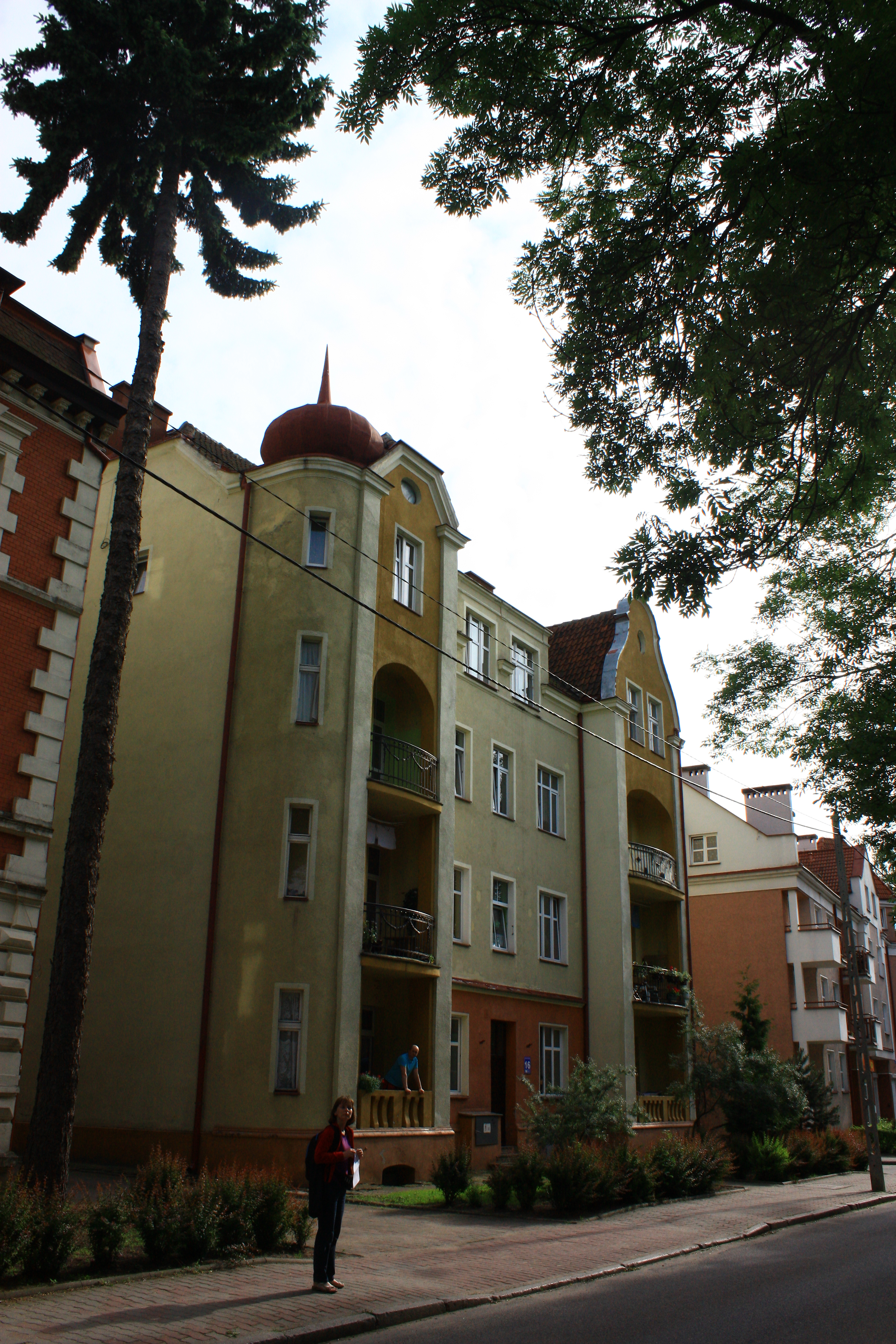 Ostróda, dom (kamienica), 1910